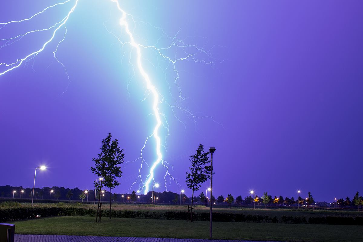 Deze bliksem is vastgelegd in Assen.